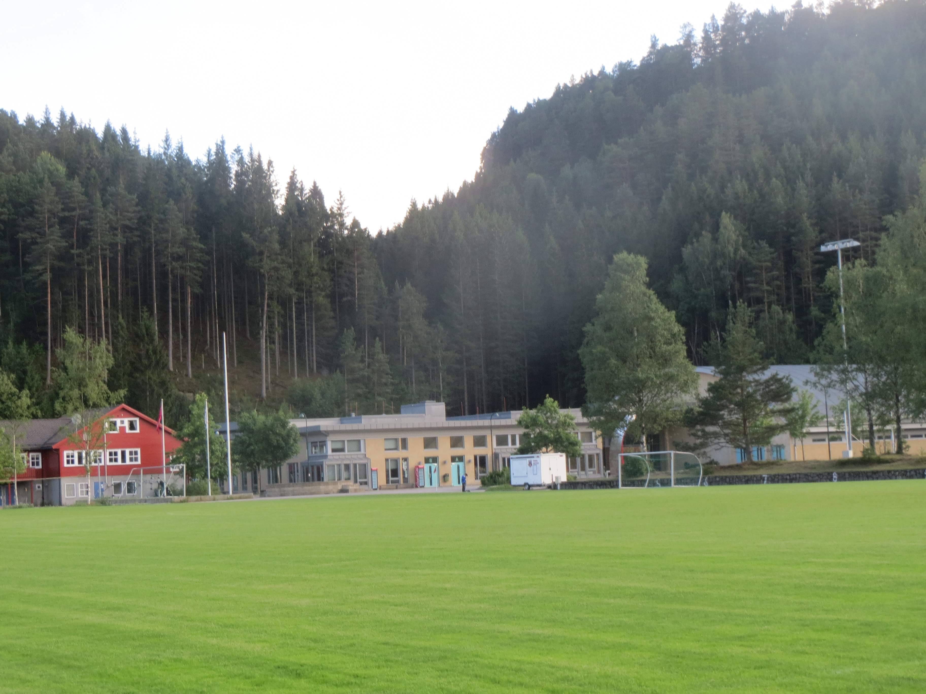 Torridal idrettspark - Hommeren, Kristiansand